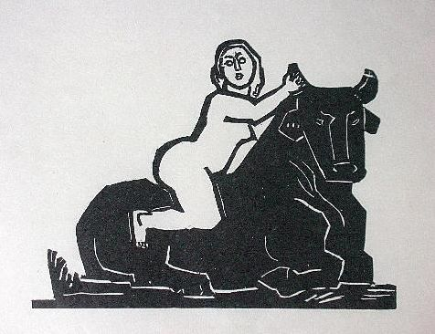 Gustav Heinrich Wolff: Europa. Holzschnitt, 1923, auf Chinabütten, verso Nachlassstempel & mit Bleistift signiert: "Gustav H. Wolff Nachlass". Blattgröße: 34 x 53 cm